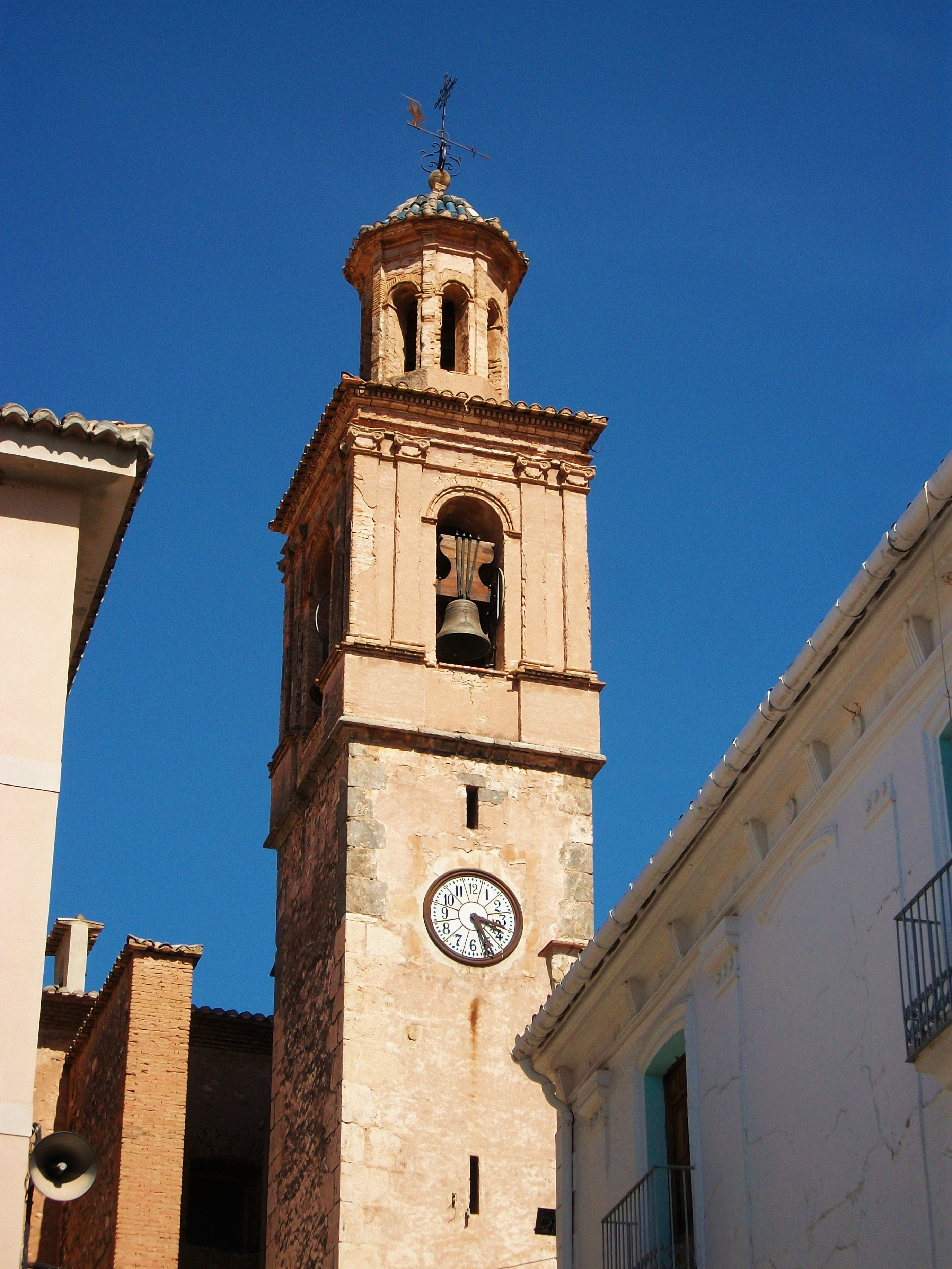 Campanar de l'església de Sant Miquel Arcàngel de Soneixa (l'Alt Palància, País Valencià). 07.106-006.